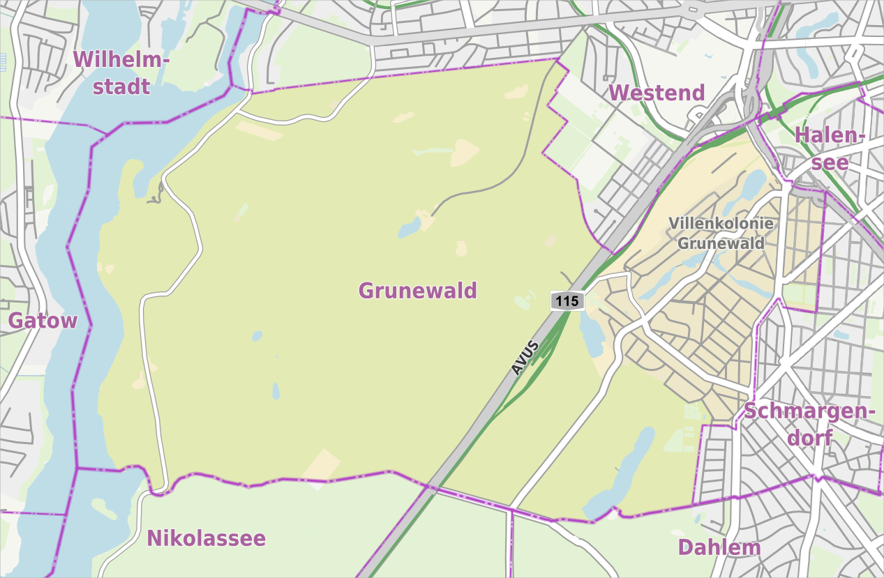 Übersichtskarte der Straßen und Ortslagen in Berlin-Grunewald